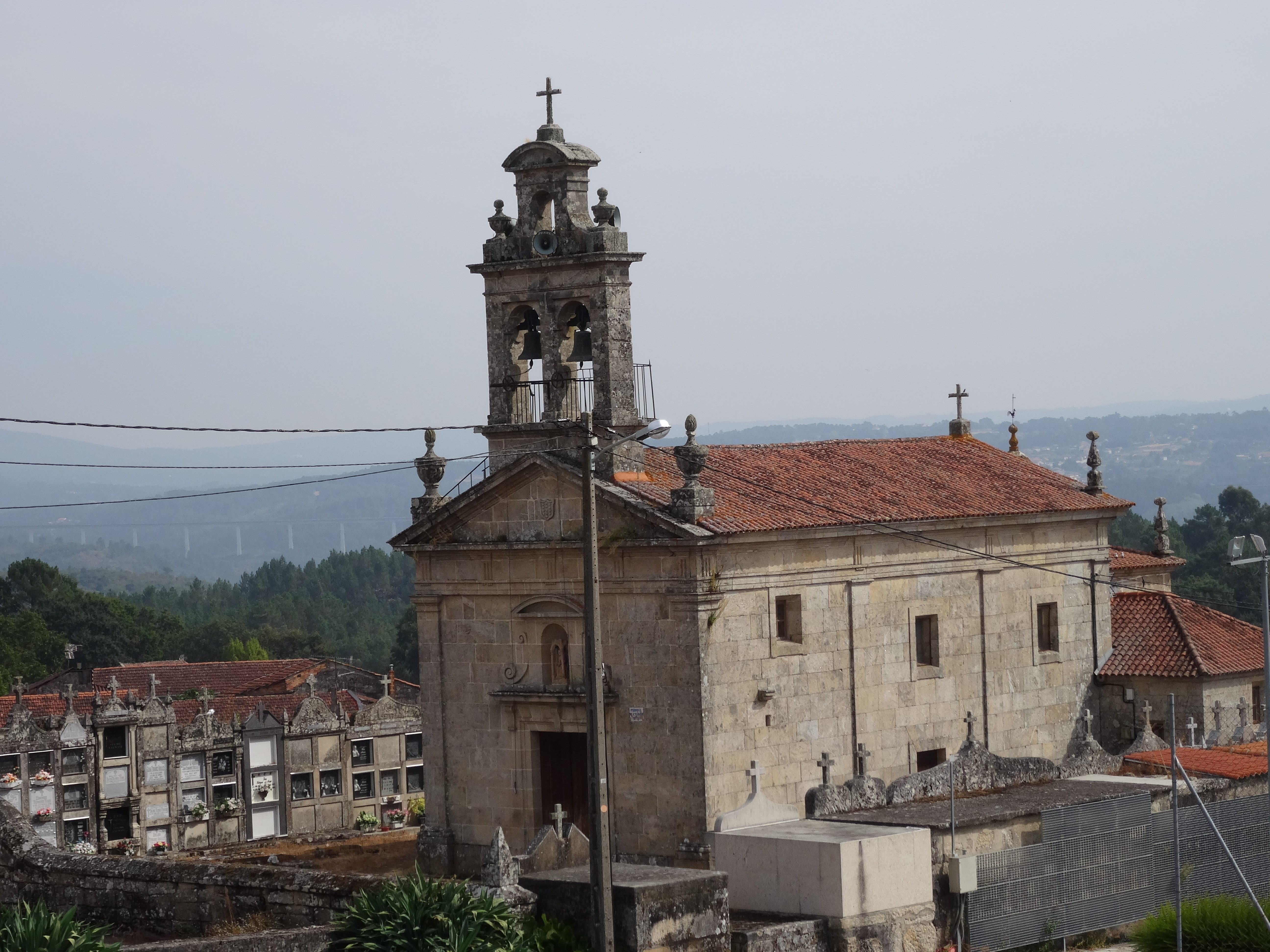 Ver título.